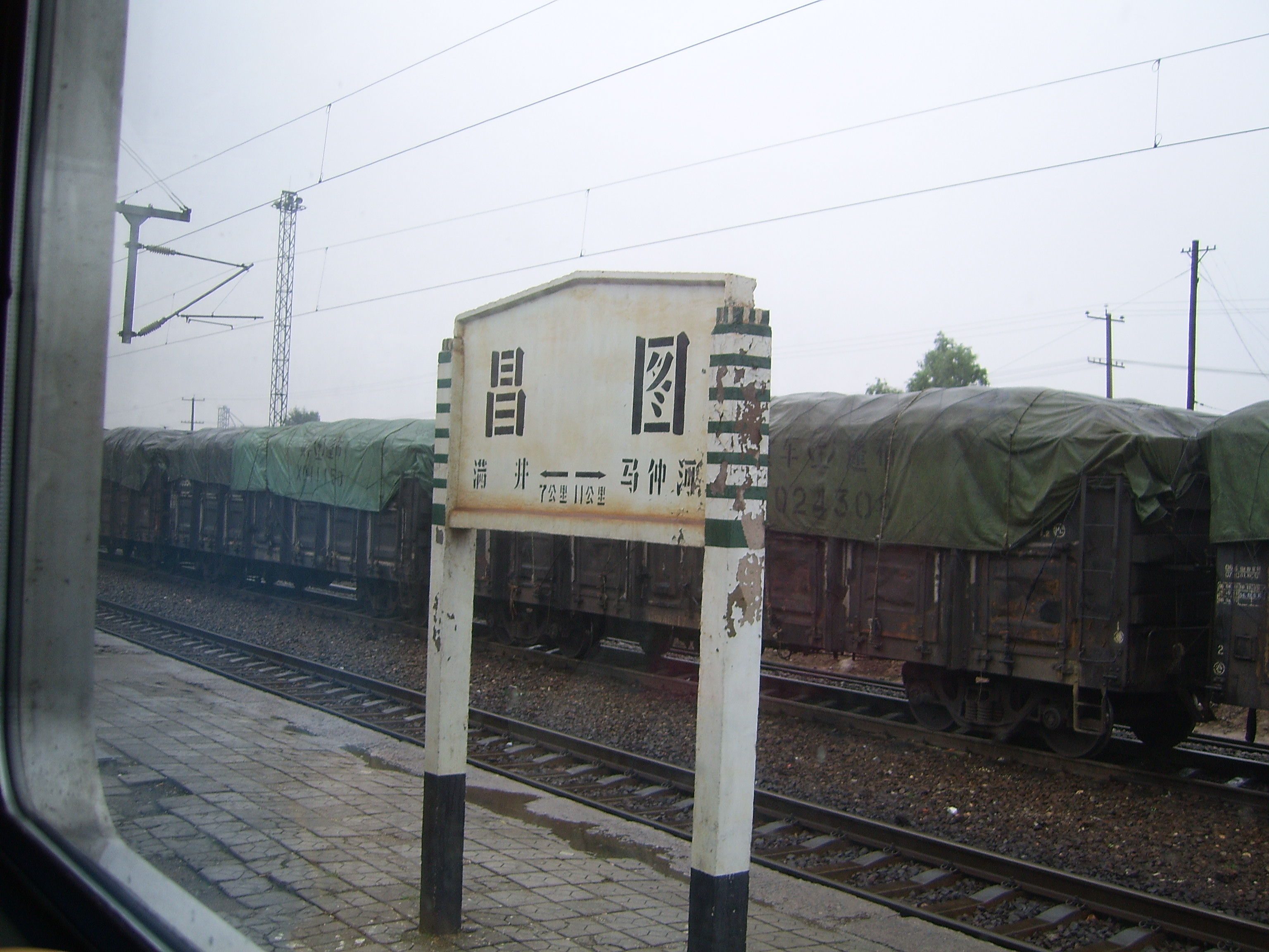 昌图站